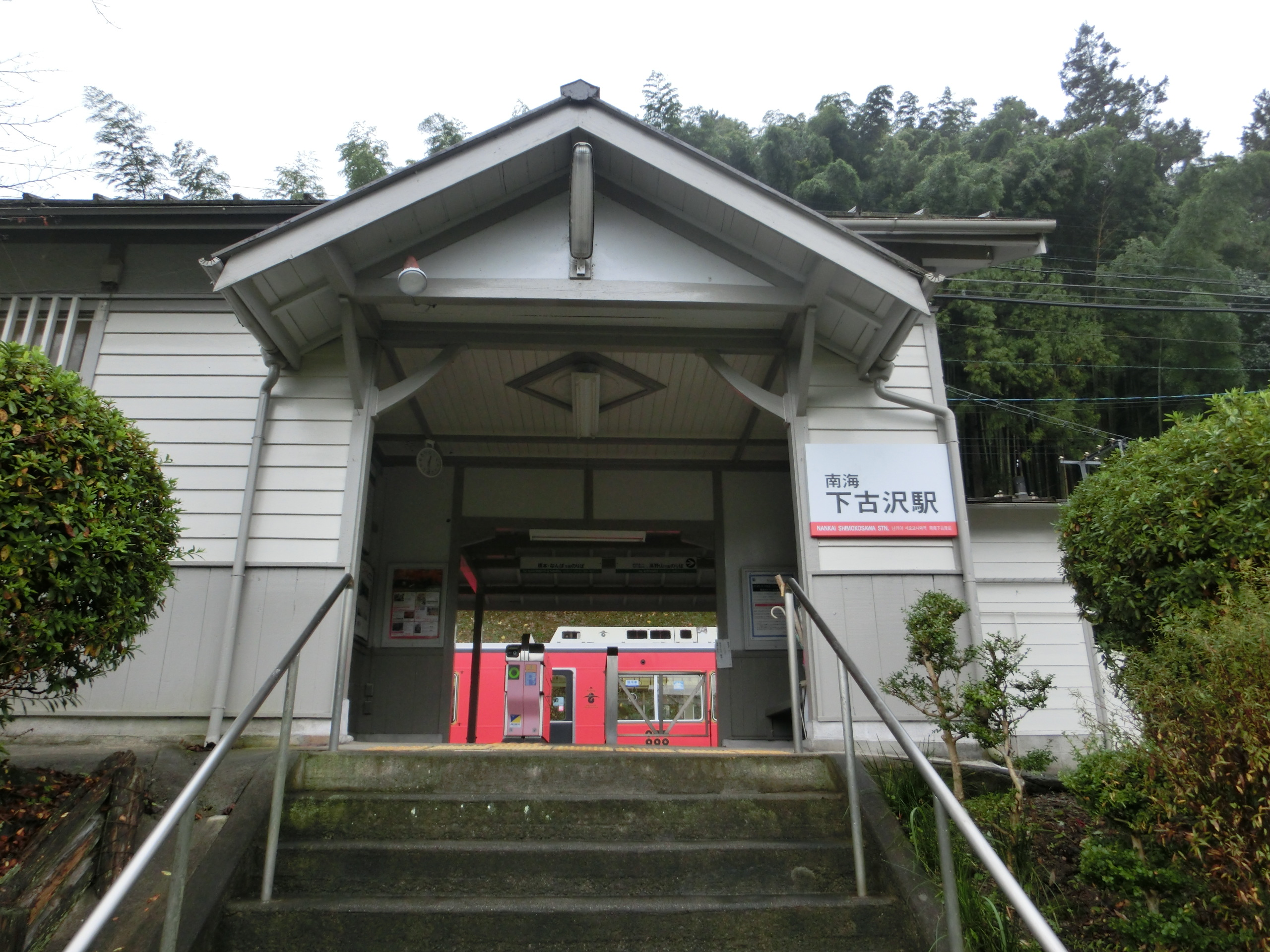 下古沢駅駅舎